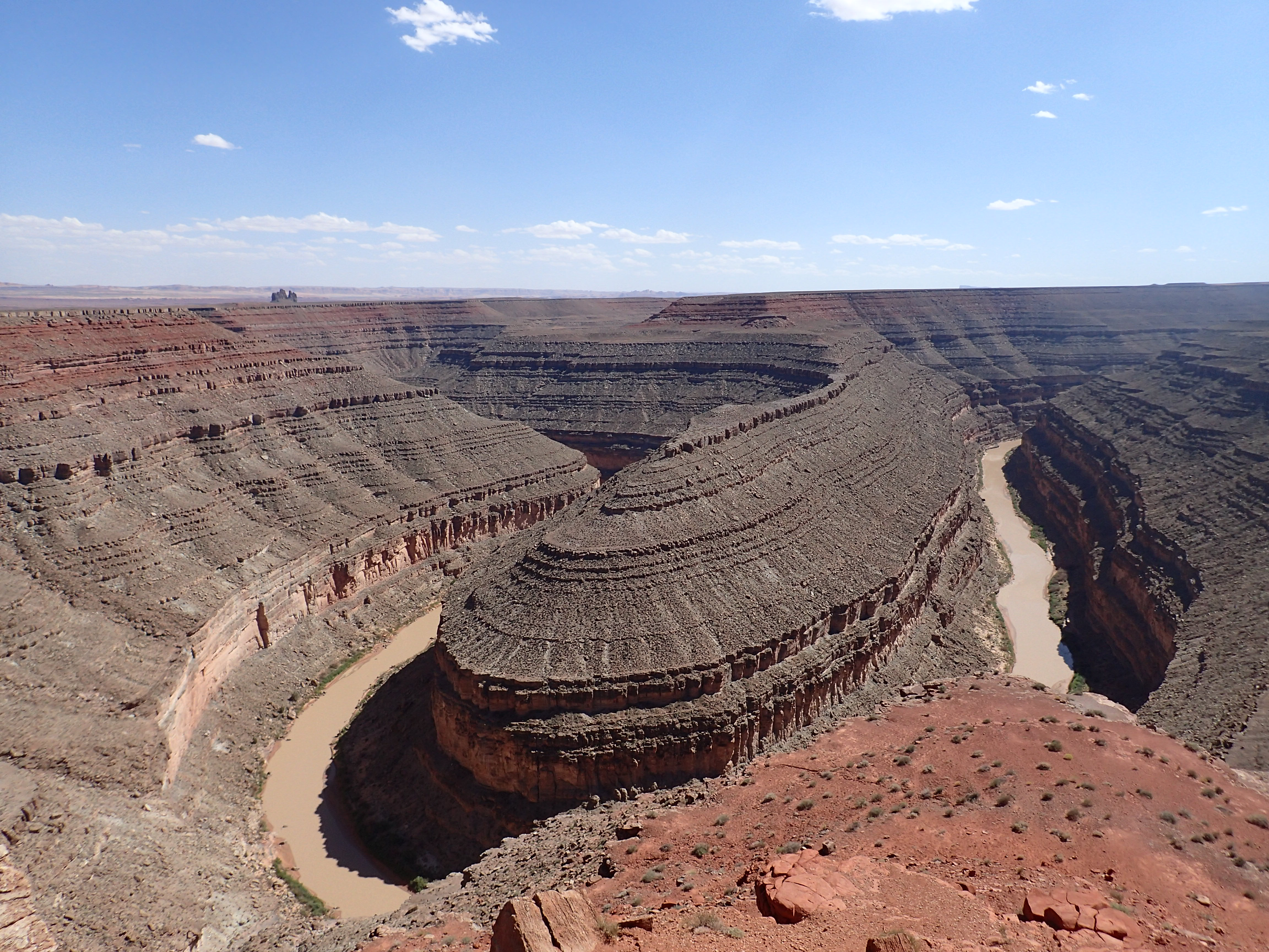 Goosenecks State Park